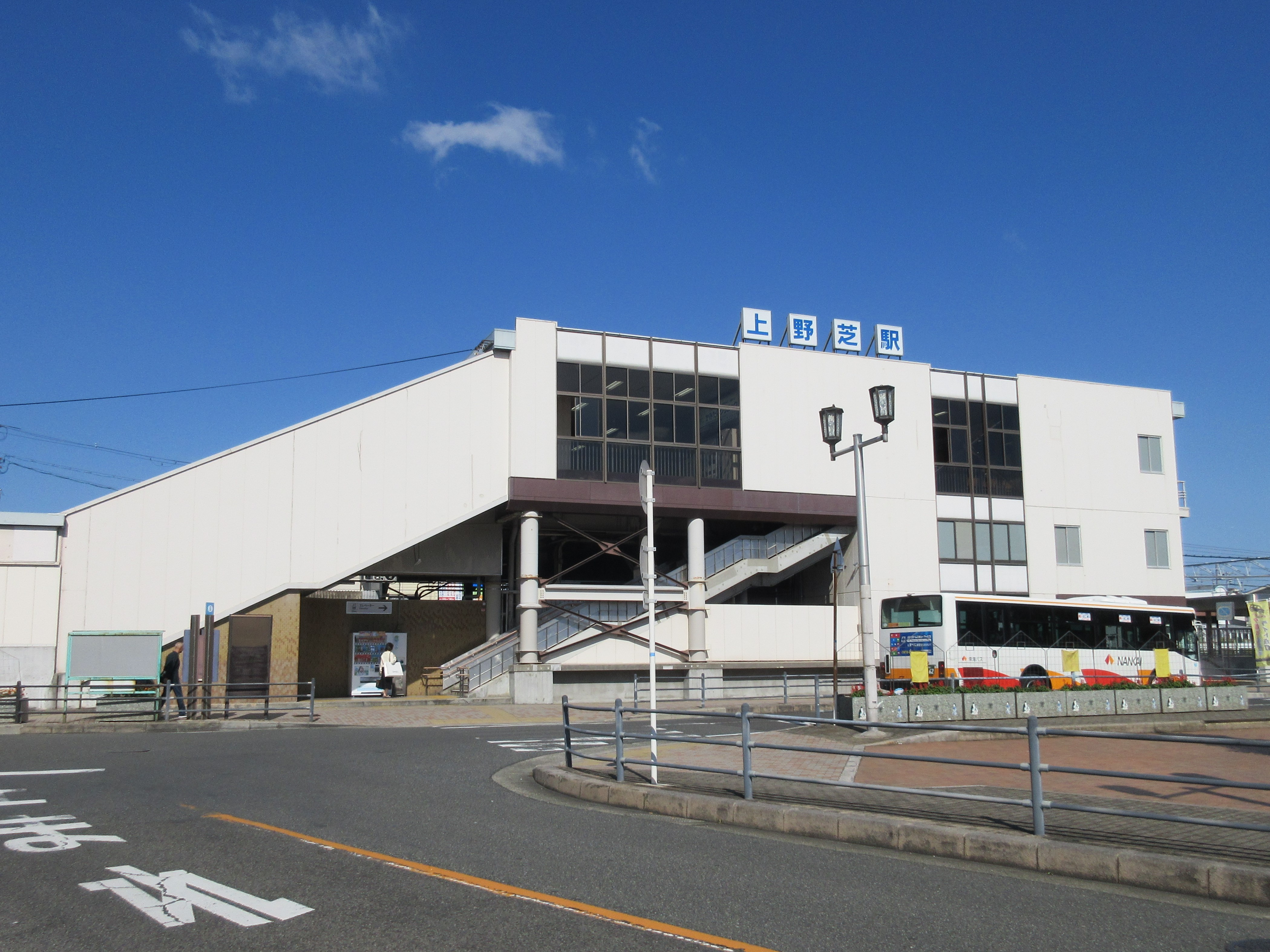 JR上野芝駅